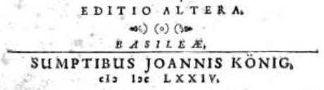 Fragment strony tytułowej tego dzieła z nietypowo zapisaną datą roczną wydania (liczba rzymska).